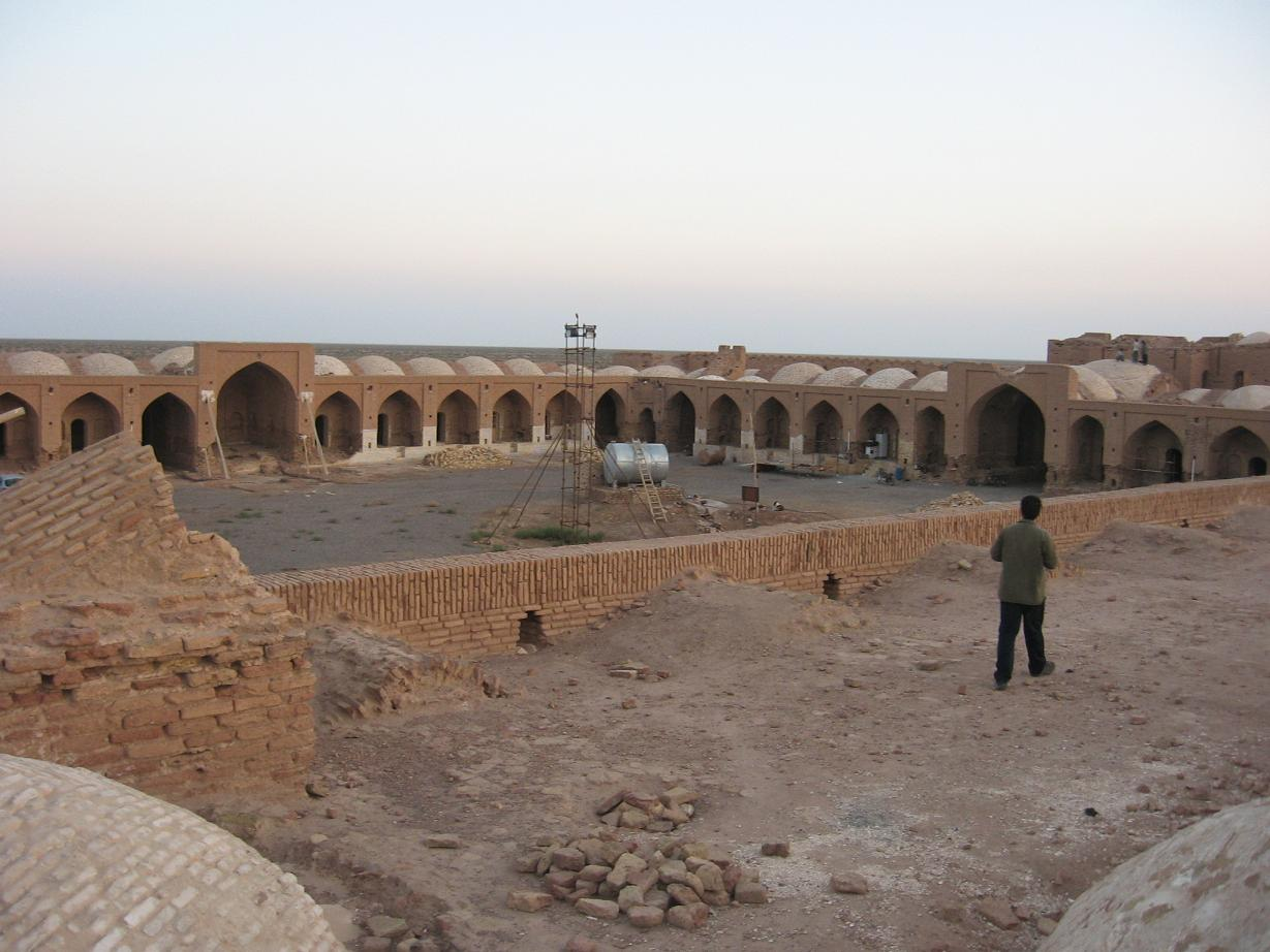 کاروانسرای دیر گچین، پائیز